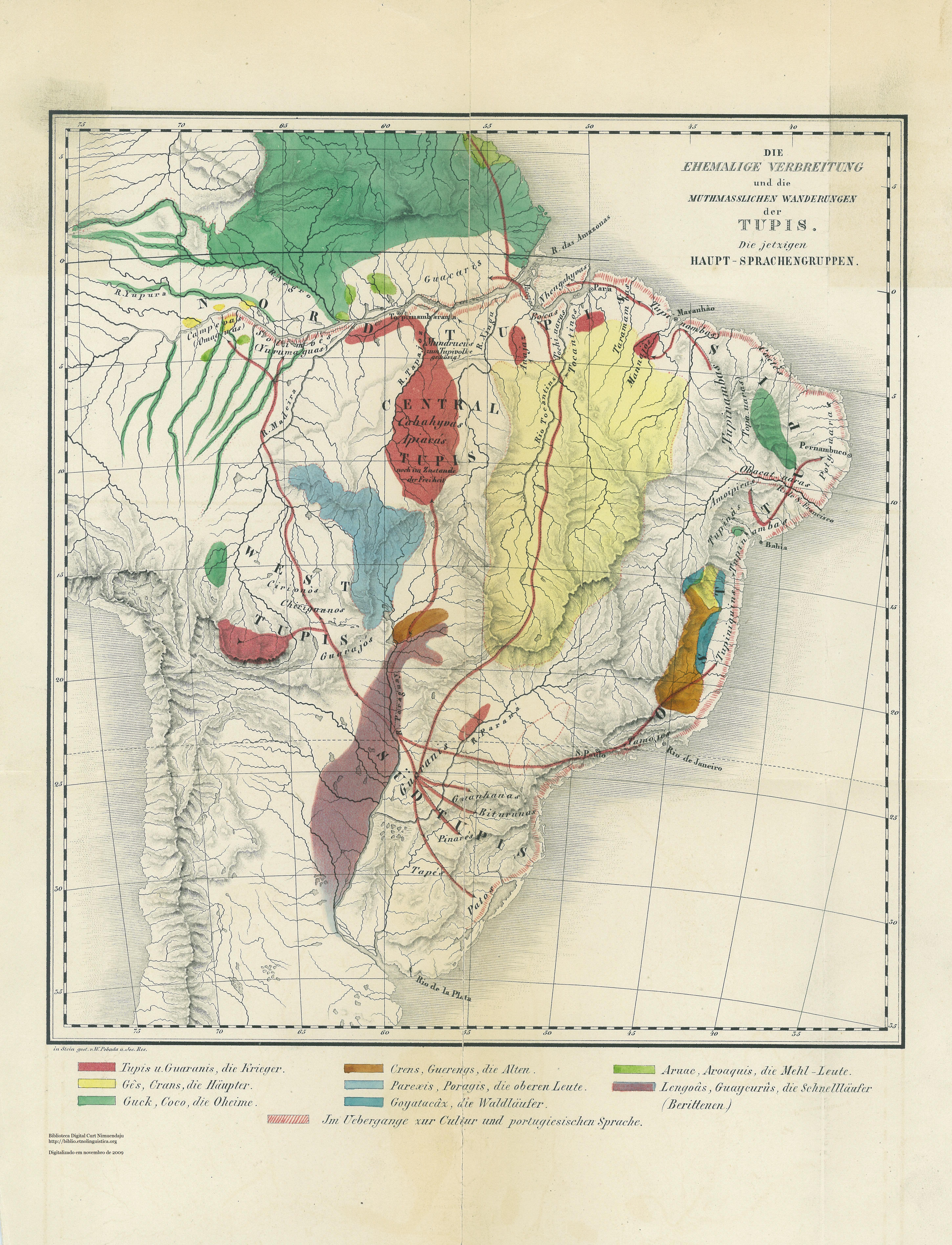 Mapa: Die ehemalige Verbreitung und die muthmasslichen Wanderungen der Tupis. Die jetzigen Haupt-Sprachengruppen. Livro: Beiträge zur Ethnographie und Sprachenkunde Amerikas zumal Brasiliens. I. Zur Ethnographie. II. Glossaria linguarum Brasiliensium [Mapa localizado no final do volume 1.] Autor: Carl Friedrich Philipp von Martius Data: 1867 Editor: Leipzig: Friedrich Fleisher Descrição: Mapa etnográfico das terras baixas da América do Sul, particularmente do Brasil, apresentando as principais famílias lingüísticas (de acordo com a classificação de Martius) e rotas migratórias Tupí. Fonte da imagem carregada: Biblioteca Digital Curt Nimuendajú, e Internet Archive, . Outras fontes do mapa: Gallica, . Fonte do livro: Internet Archive, vol. 1 , vol. 2, . Informações bibliográficas: Moraes, 1983 [1958], Bibliographia brasiliana, vol. 2, p. 529. Disponível em: Biblioteca Nacional, .